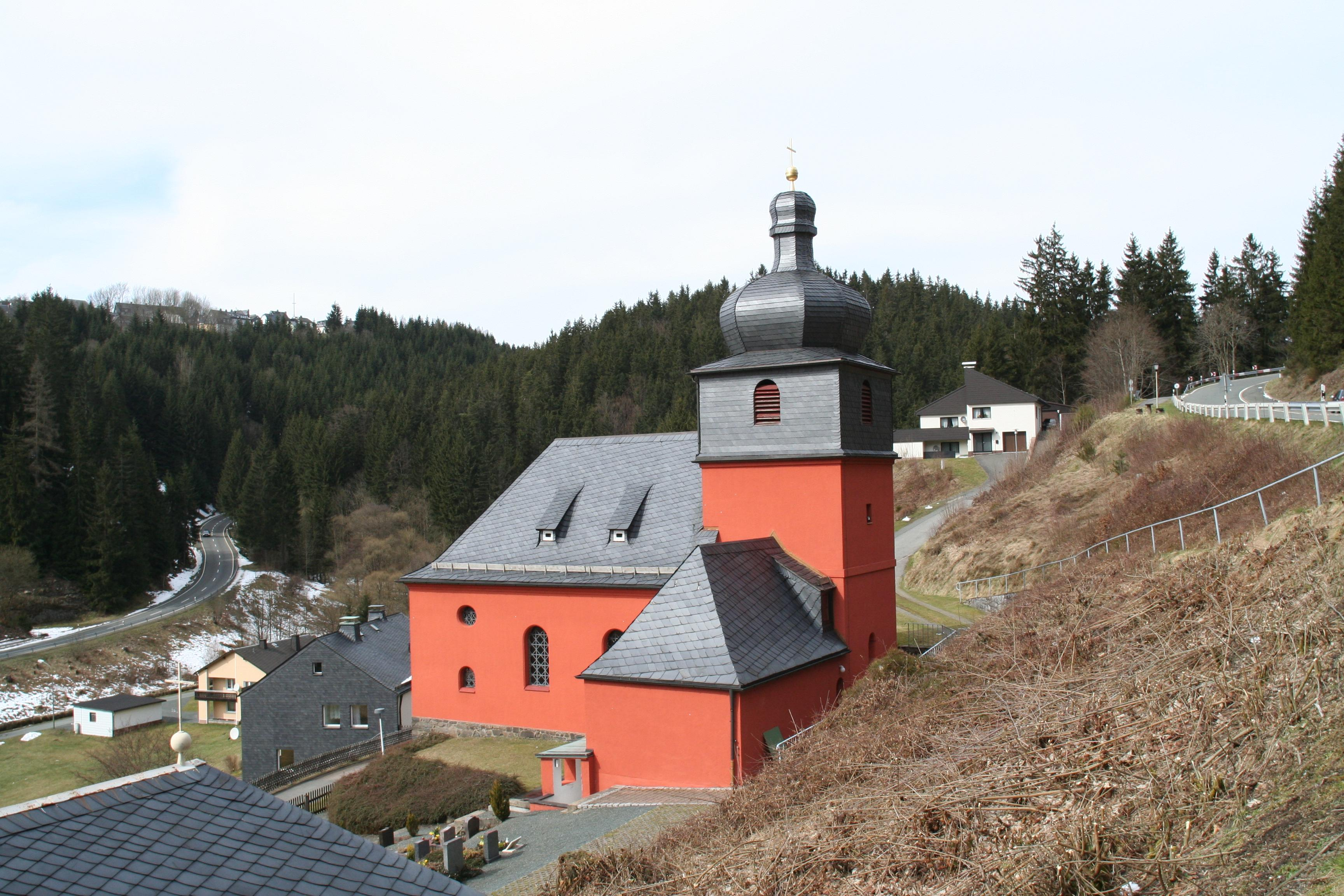 evangelisch-lutherische Jubilate-Kirche in Nordhalben-Grund (Landkreis Kronach, Regierungsbezirk Oberfranken, Freistaat Bayern, Deutschland), Grundsteinlegung Oktober 1925